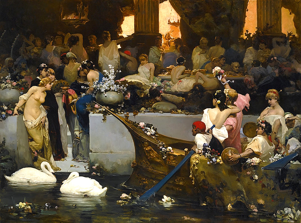 картины художника Котарбинского Вильгельма Александровича (1948-1921)